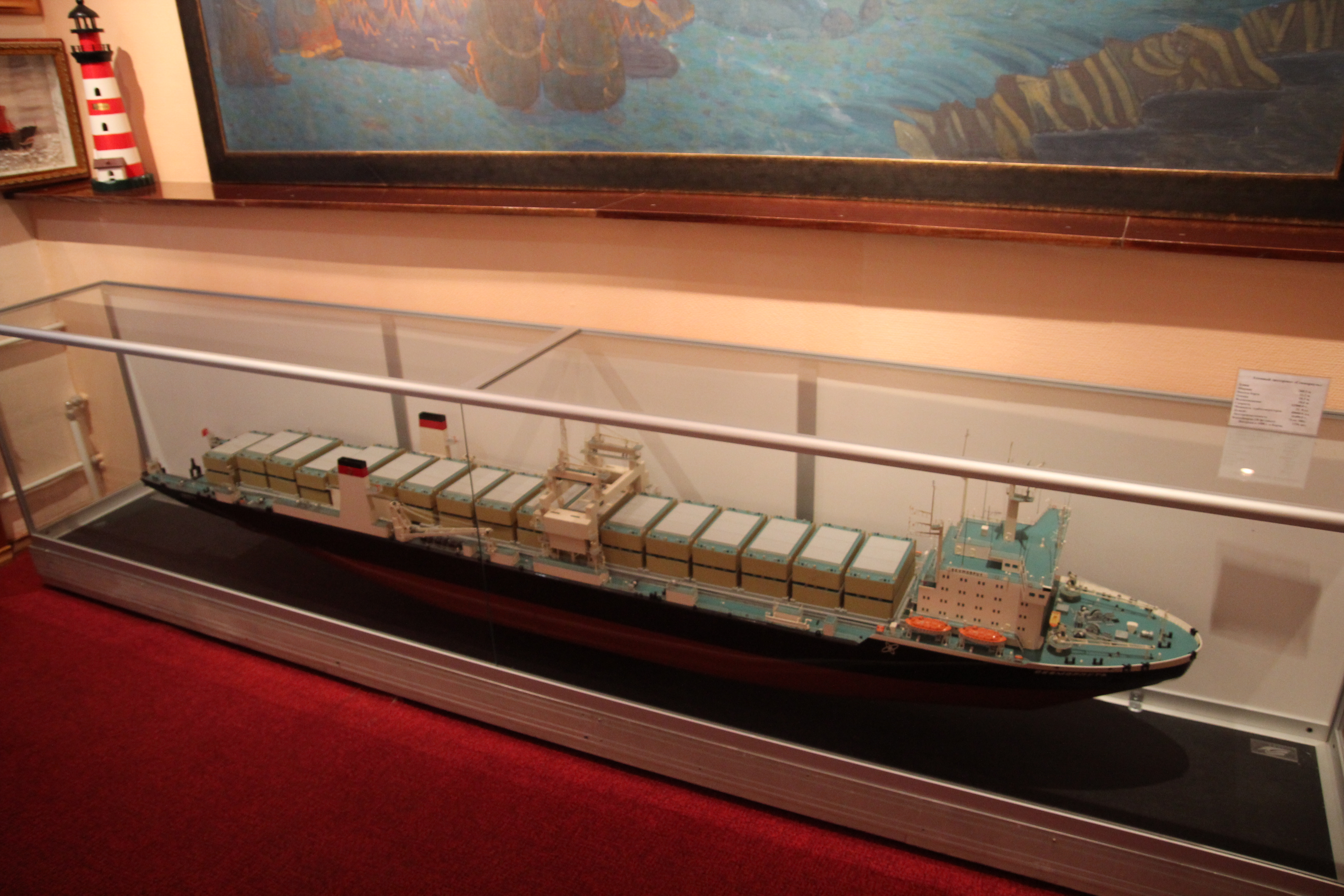 Модель судна Севморпуть